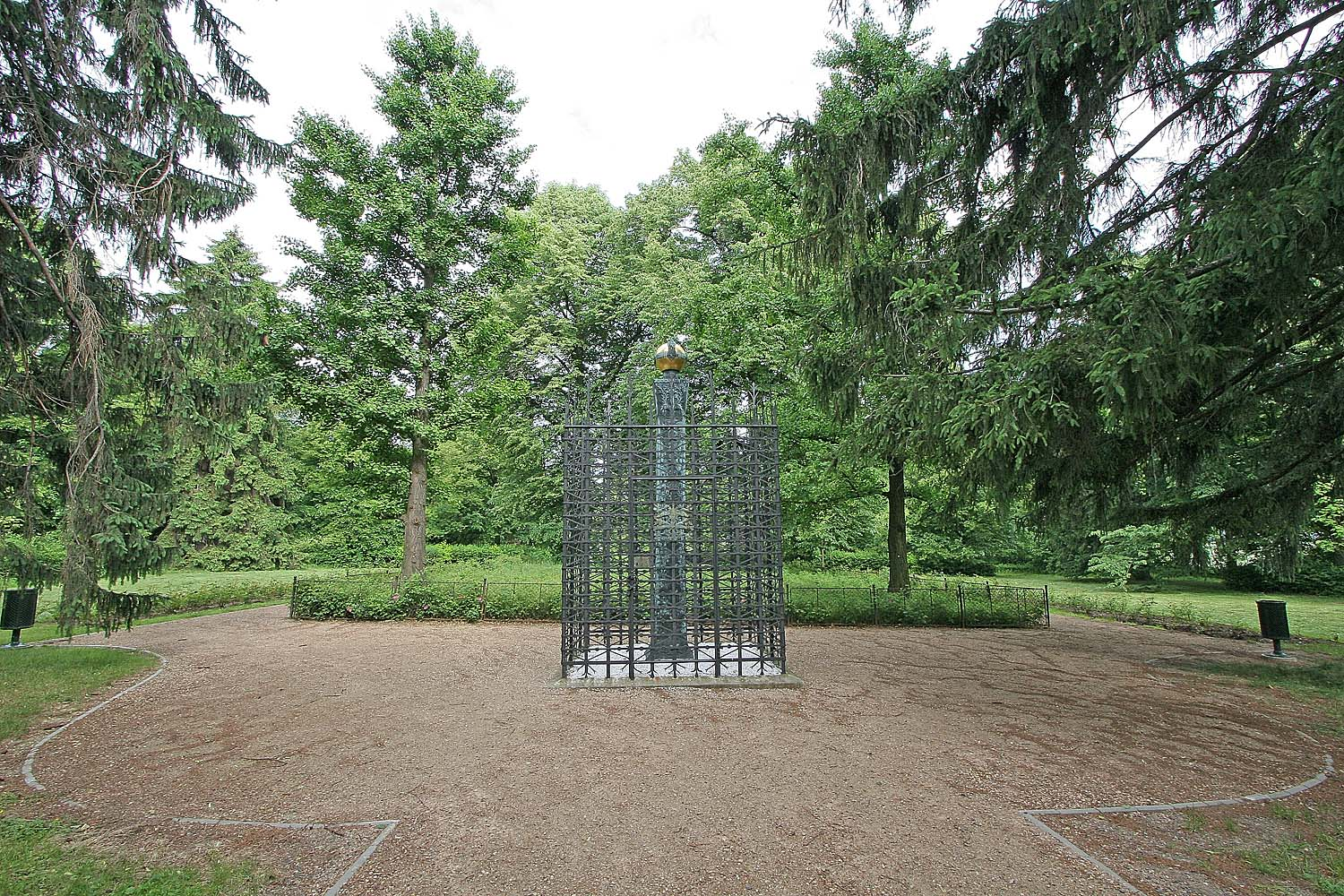 Růžový palouček - plastika